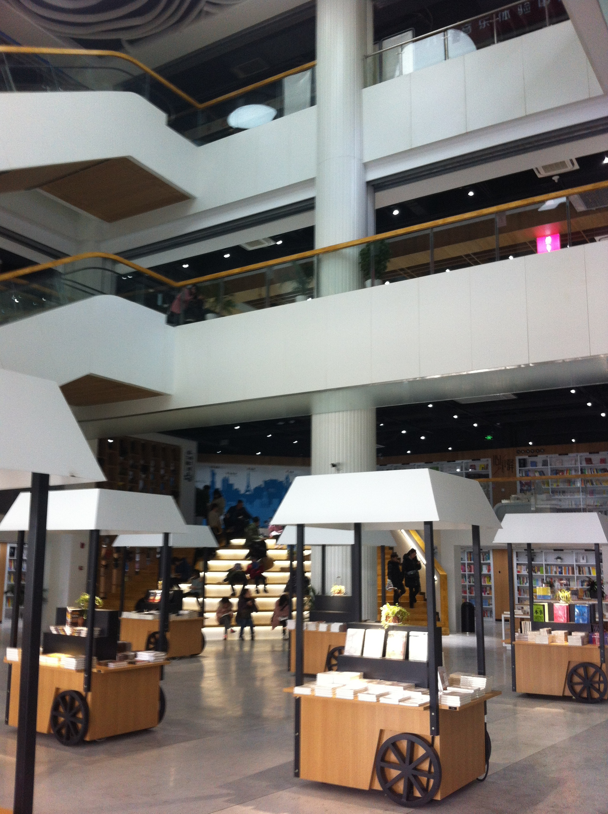 中文（中国大陆）: 玉环书城一角